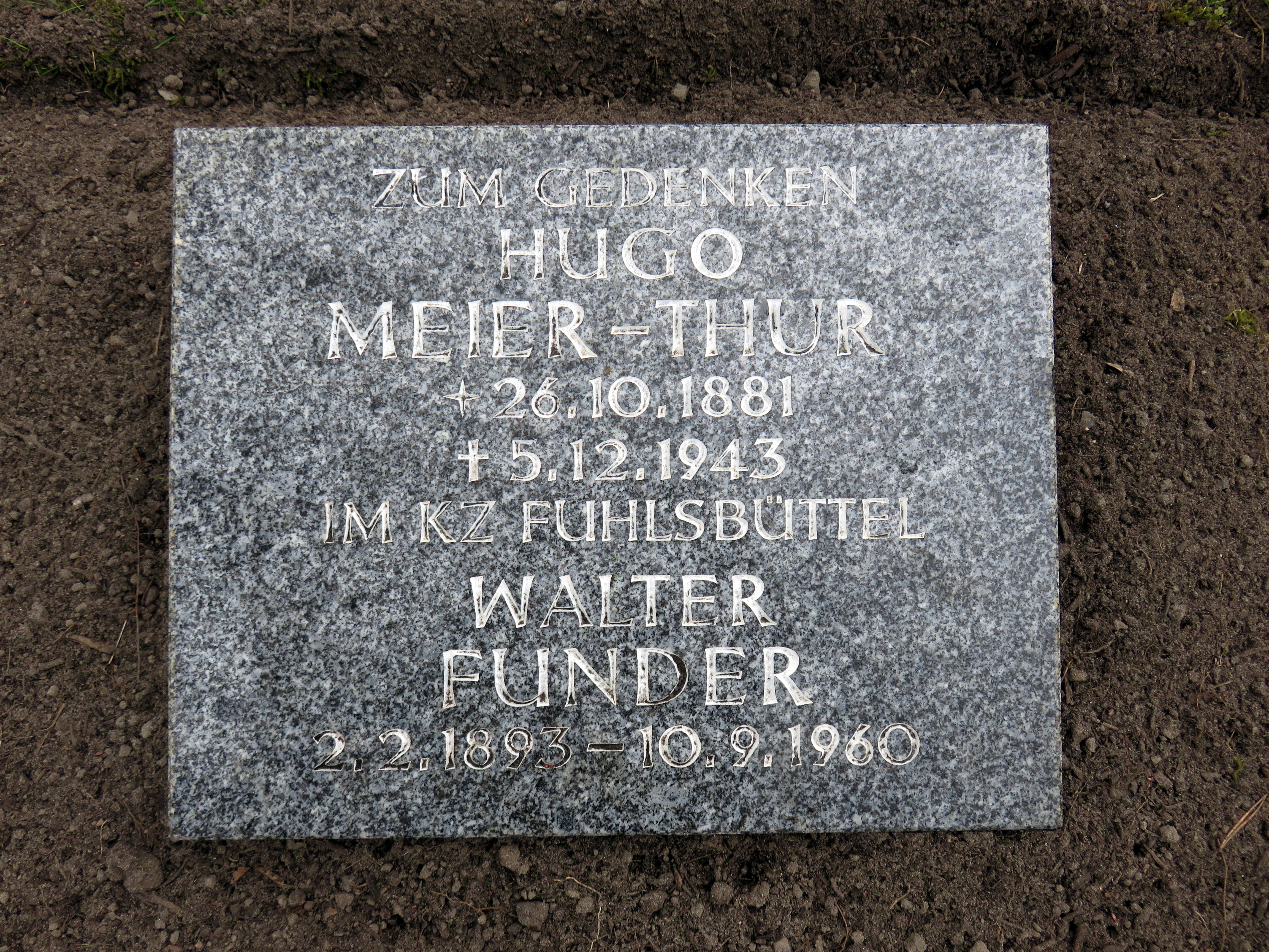 Kissenstein zum Gedenken an den deutschen Grafiker und Maler Hugo Meier-Thur (sowie Walter Funder) im Bereich des Ehrenfeldes der Geschwister-Scholl-Stiftung, Friedhof Ohlsdorf, Planquadrat Bo 73 (beim Eingang Seehof).